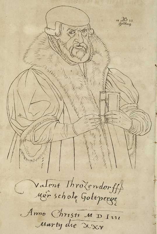 Frontispiece from: Pinzger, Gustav (1825) (in German) Valentin Friedland Trotzendorf., Hirschberg: Krahn